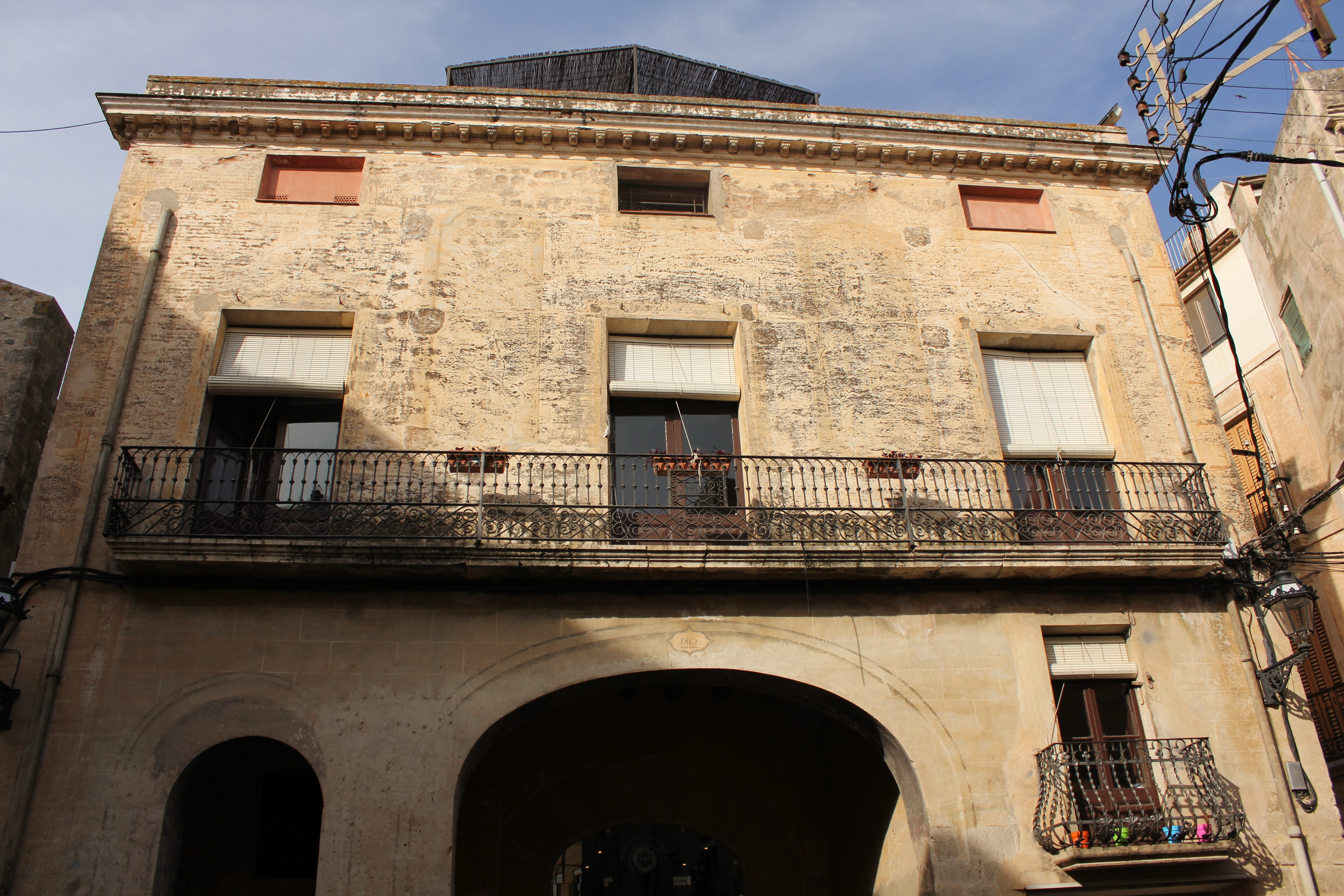 La Casa de Bató (Alforja)